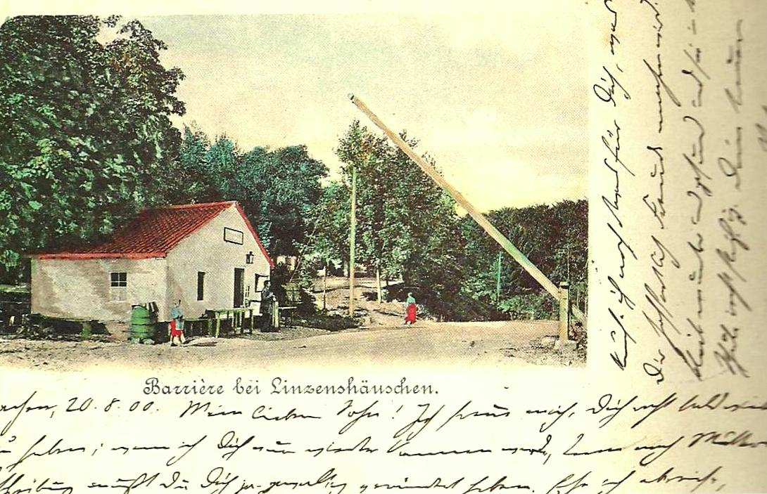 Zollbarriere bei Linzenshäuschen